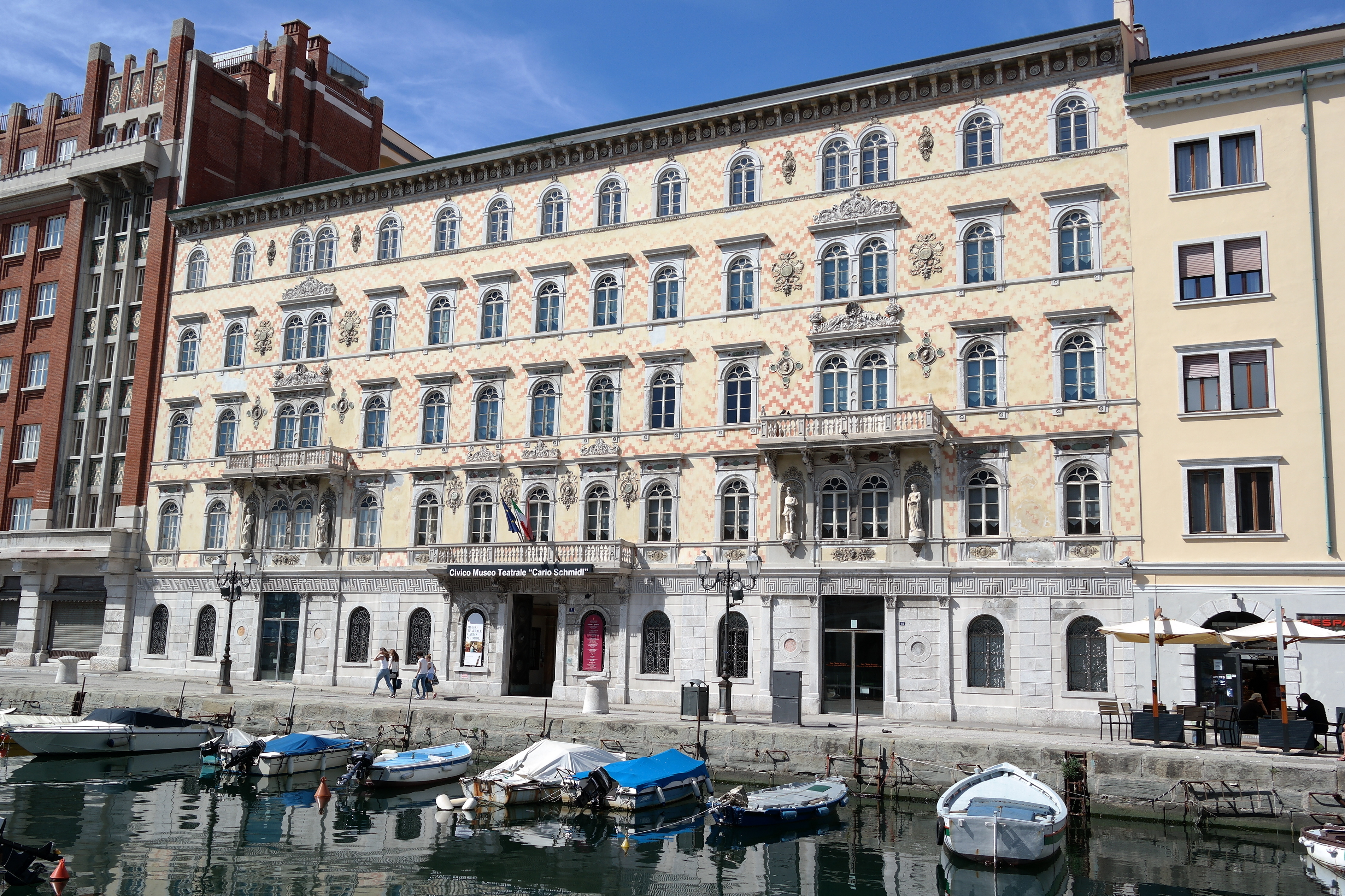 Palazzo Gopcevich, sede del Museo teatrale Carlo Schmidl, a Trieste